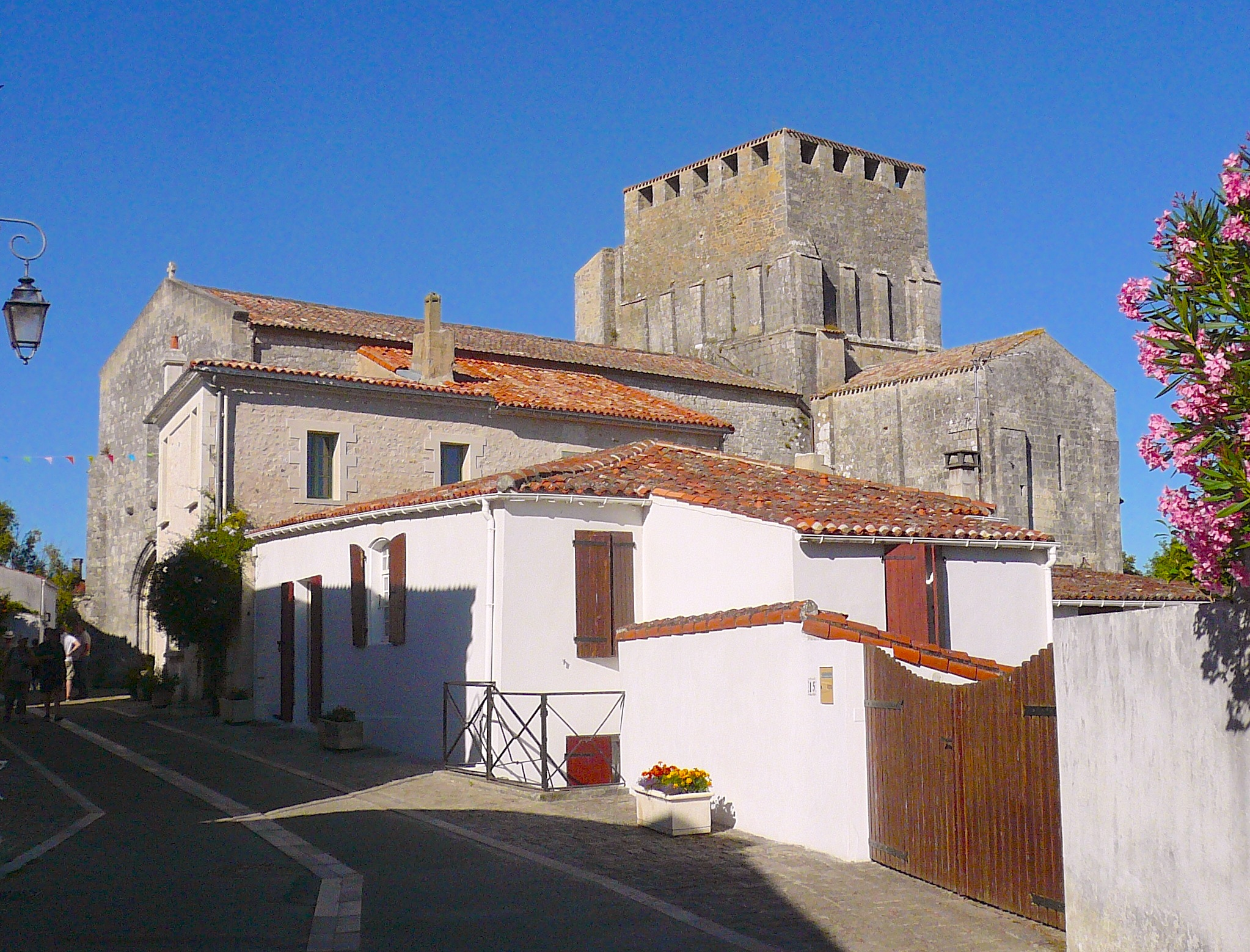 L'église Saint-Pierre de Mornac-sur-Seudre depuis la rue du Port.